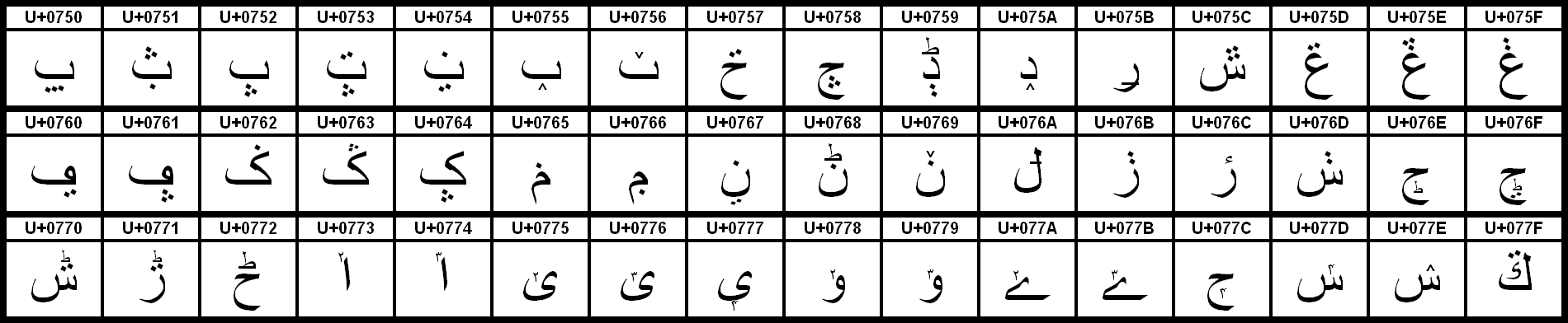 Grafiktafel für den Unicodeblock Arabisch, Ergänzung. Schraffierte Felder sind unbesetzte Codepoints.